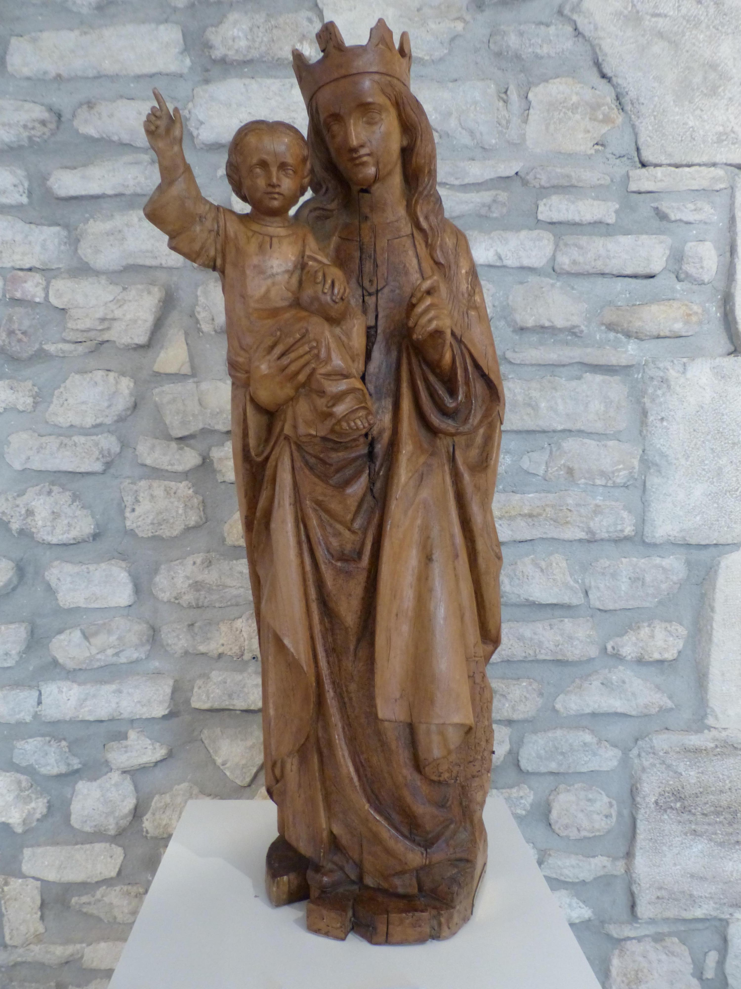 Vierge à l'enfant. Bois naturel. XVIe siècle. Provient de l'église Saint-Martin de Charmes (Allier). Gannat, musée Yves-Machelon.